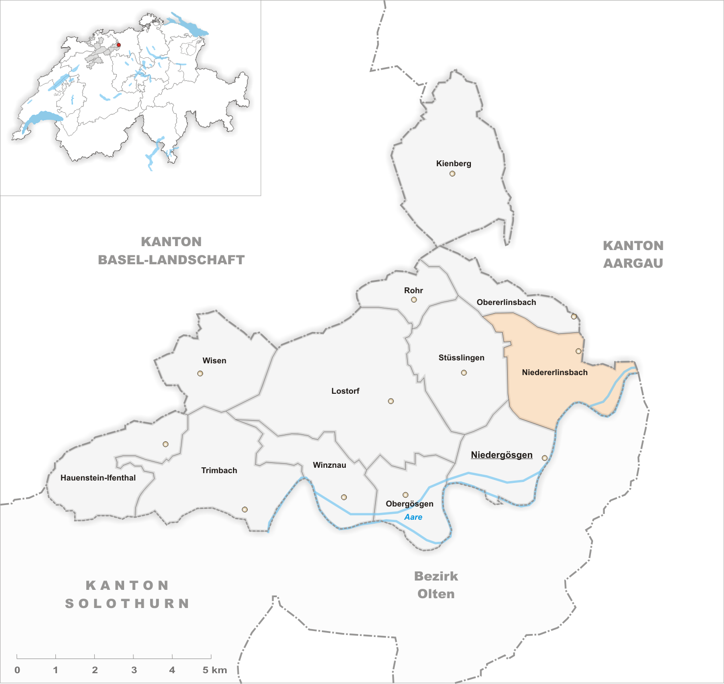 Municipality Niedererlinsbach Artist: Tschubby